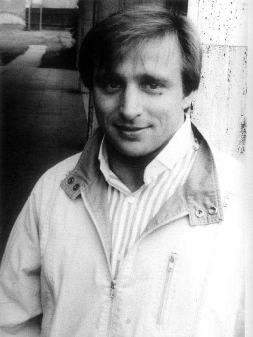 Marek Seweryn